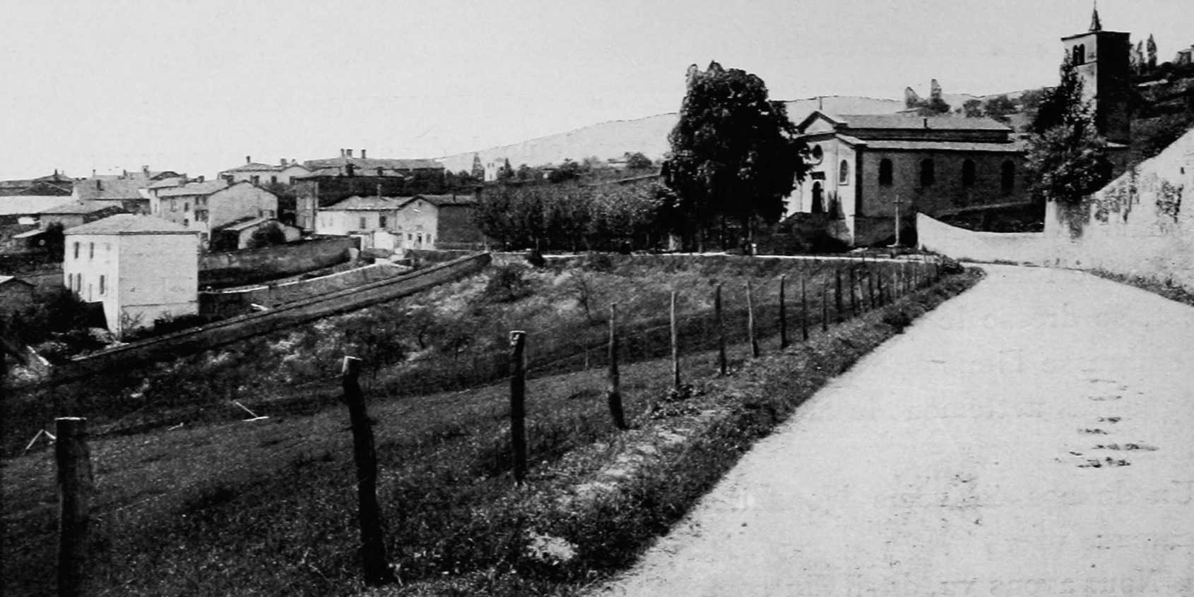 Dictionnaire illustré des communes du département du Rhône. Tome 2 / par MM. E. de Rolland et D. Clouzet.